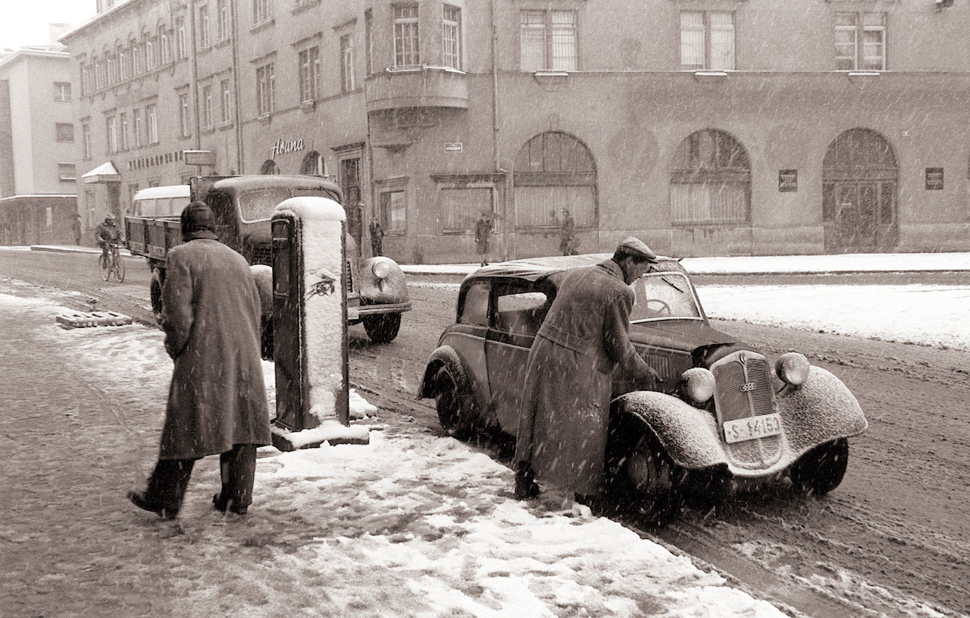 Bencinska črpalka na Trgu revolucije.